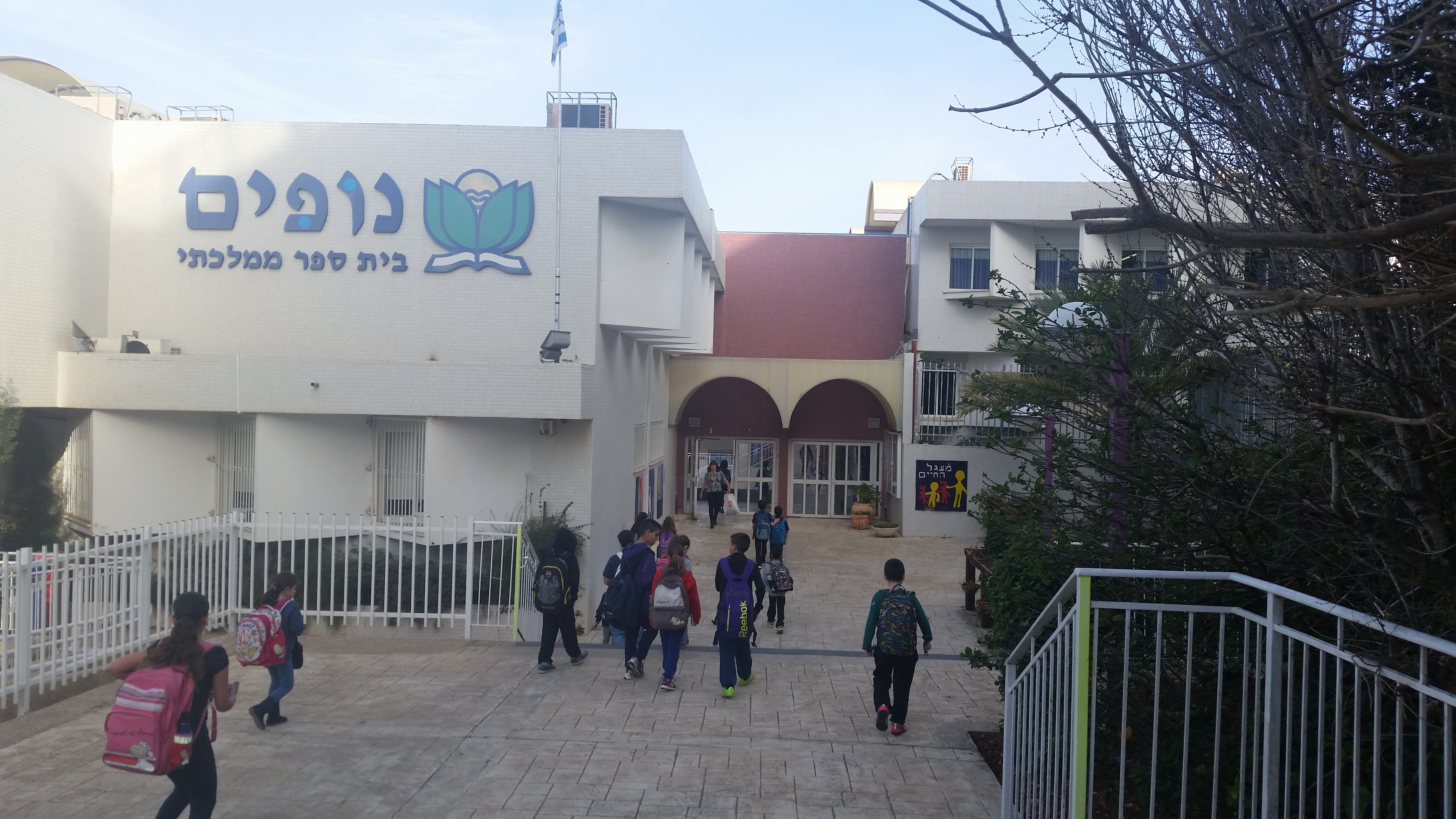 בית ספר נופים ברמת בגין בחיפה נוסד בשנת 1994